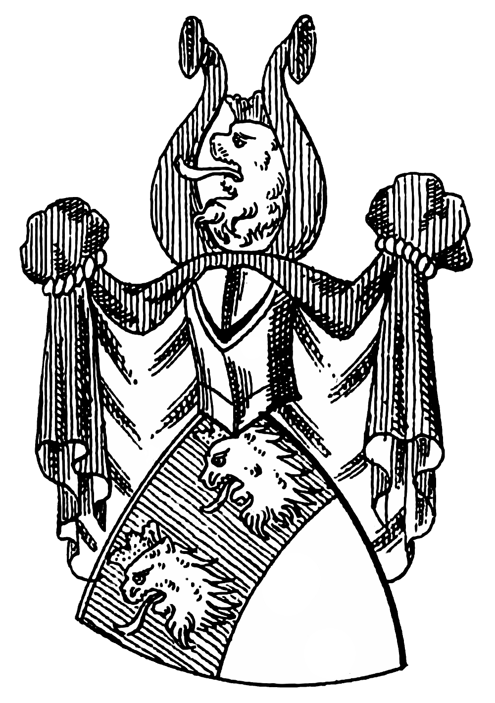 Wappen derer von Rebstock